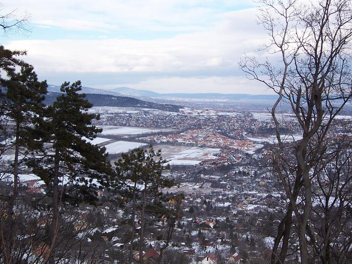 Üröm